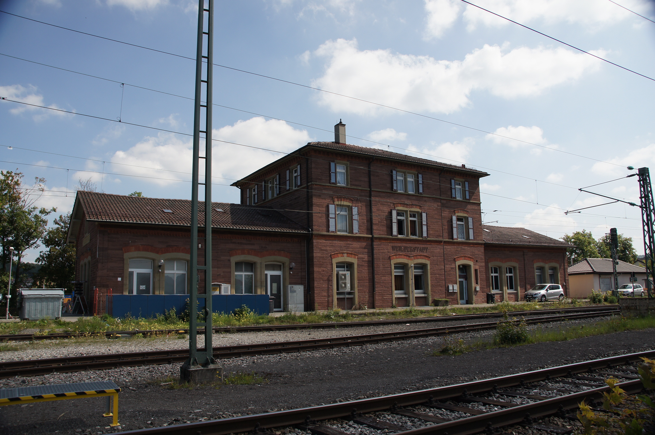 Bahnhof Weil der Stadt